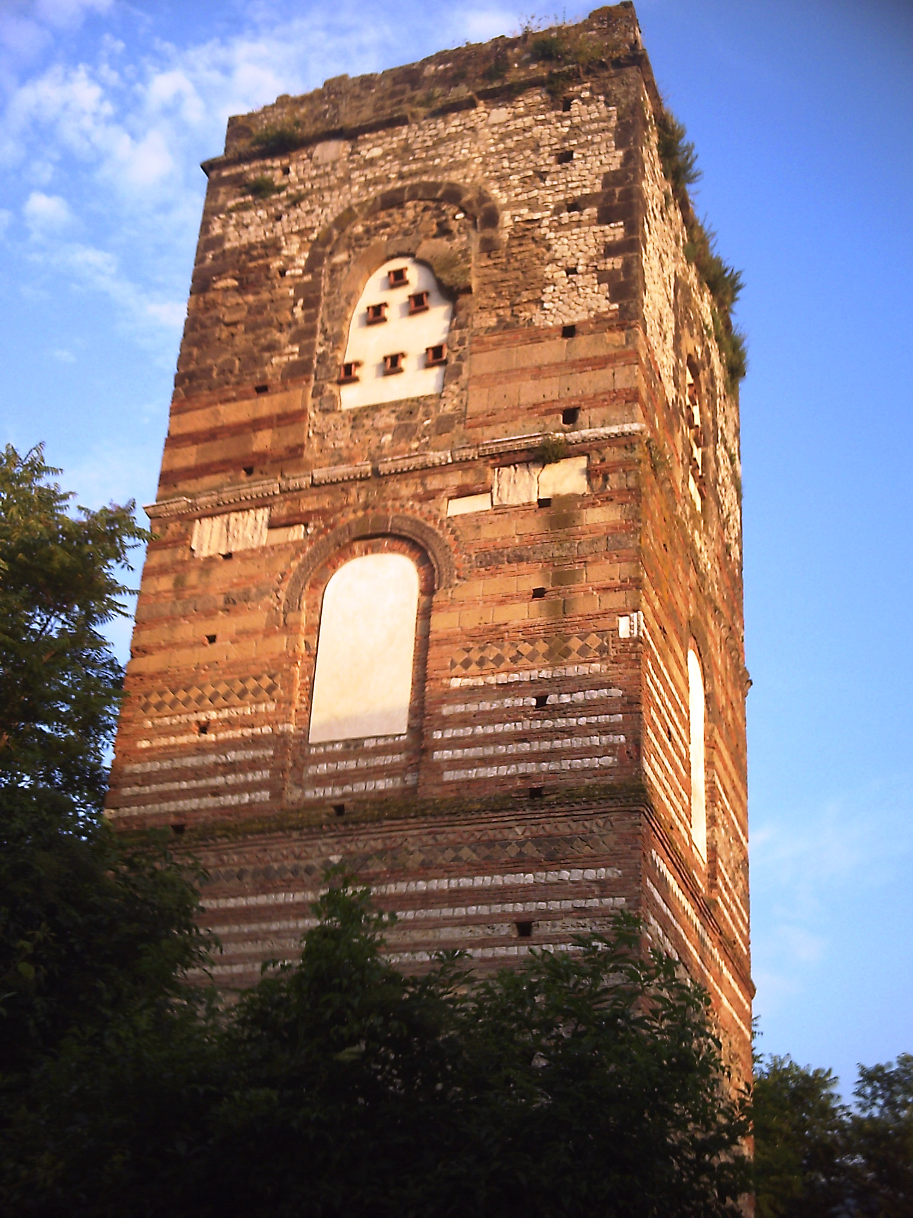 Particolare della torre campanaria presso i ruderi della Cattedrale di Telese (Bn)